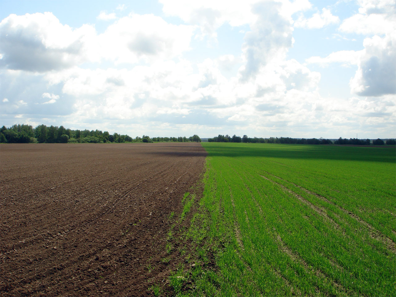 Поле близ деревни Крутая.